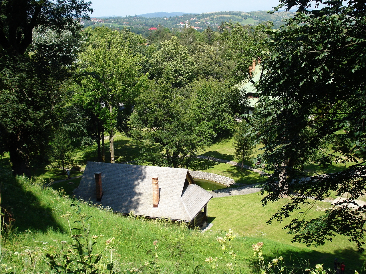 Parcul castelului Bran 05